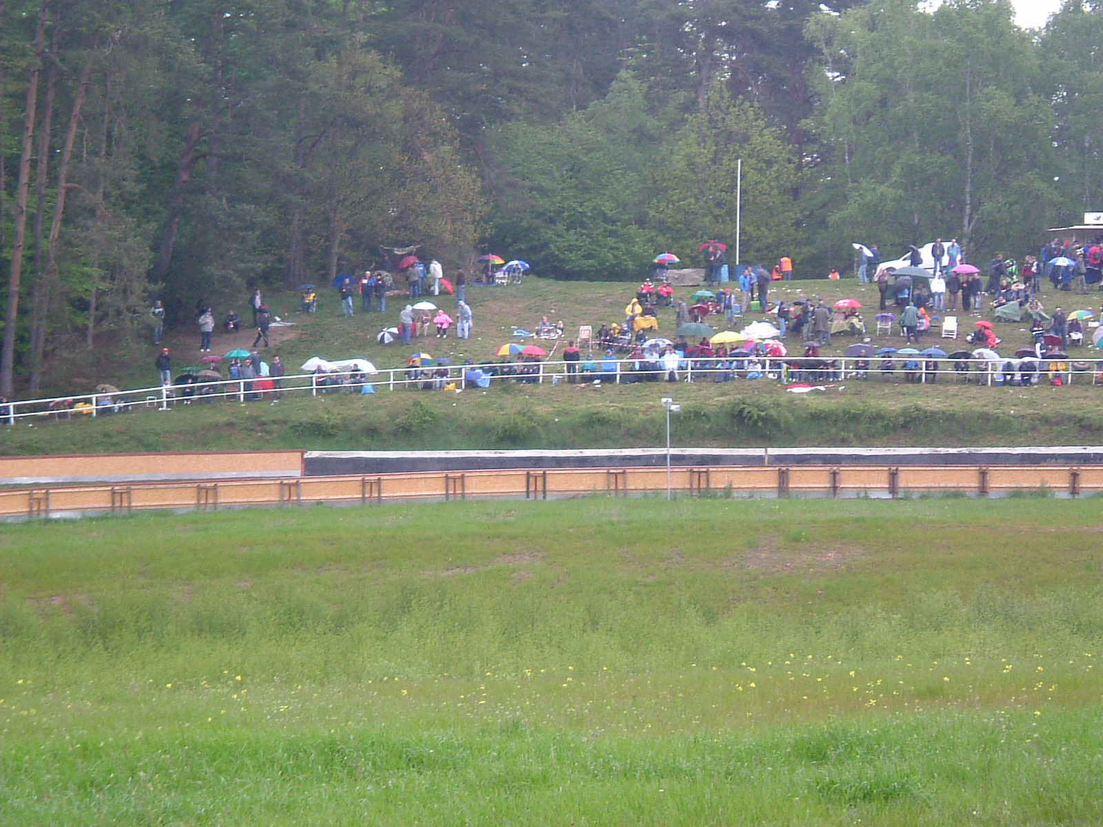 Nordkurve des Teterower Bergrings